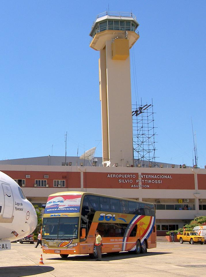 Refacciones en el aeropuerto de Asunción